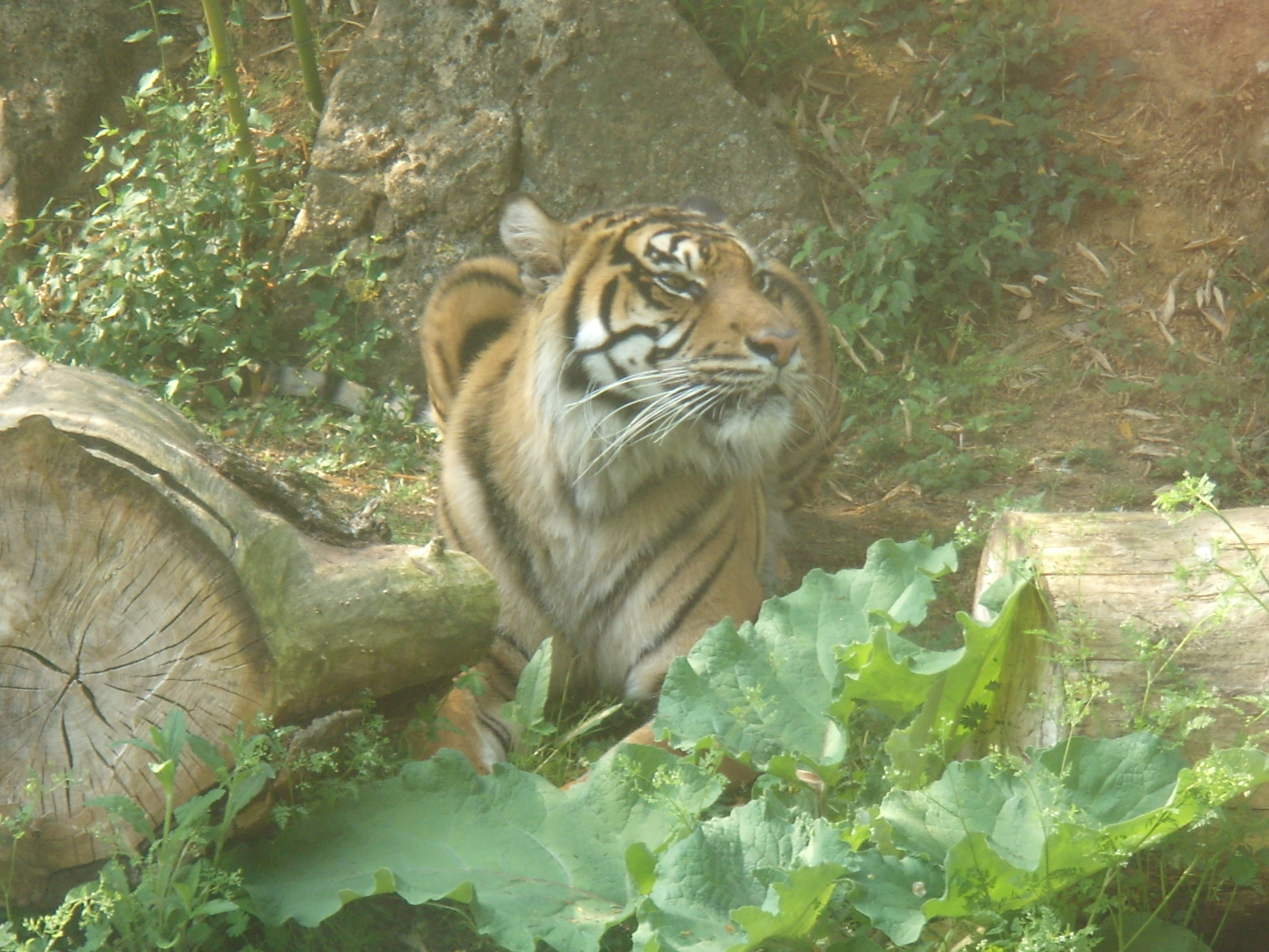 un tigre de Sumatra au Bioparc zoo de Doué-la-Fontaine